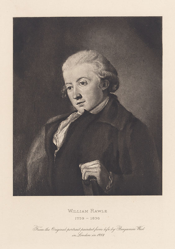 William Rawle (1759-1836)